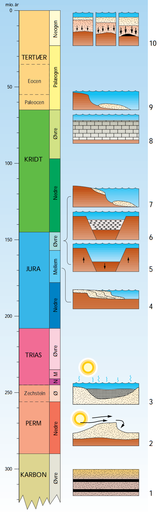 Stratigrafisk søjle med vigtige begivenheder i nordsøoliens dannelse